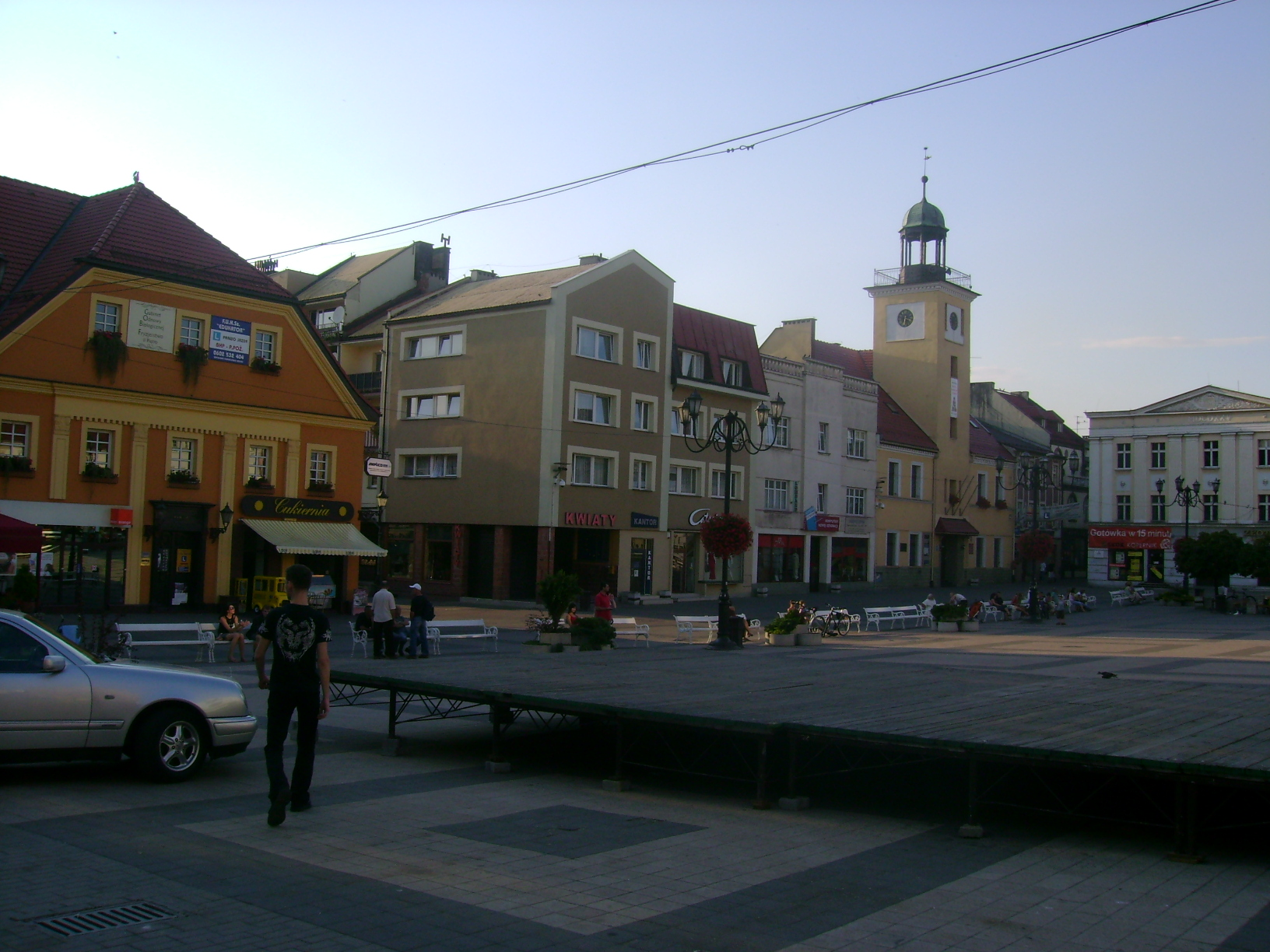 market square, Rybnik